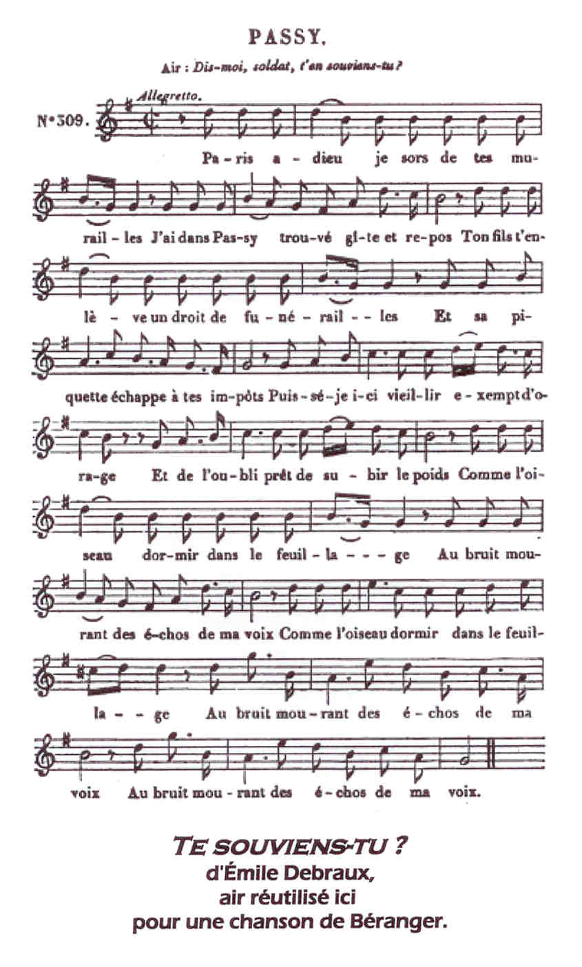 L'air de la chanson de Debraux "Te souviens-tu ?" (1817) réutilisé ici par Béranger pour sa chanson "Passy".